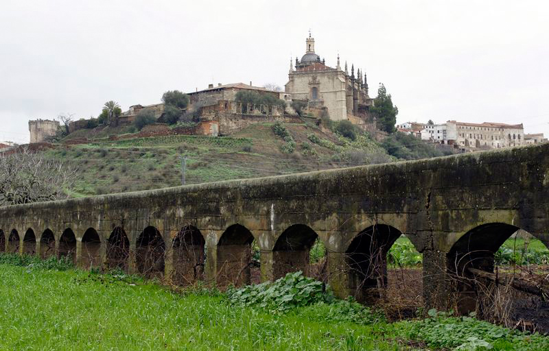 Vista de la Catedral de Coria desde canalización de agua típica